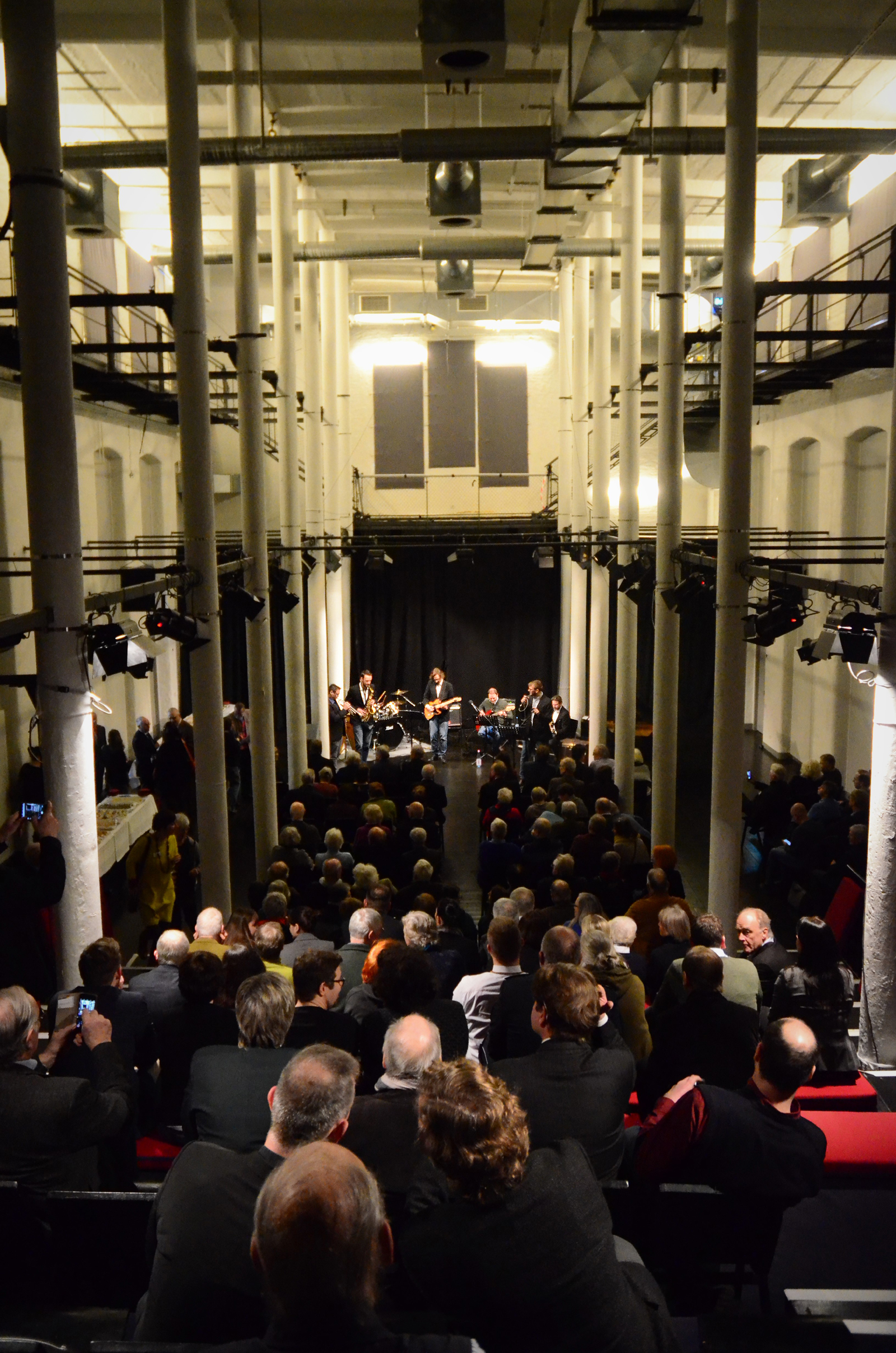 Musiker auf der Bühne im großen Saal des Alten Magazins in der Südstadt von Hannover, Kestnerstraße 18, während des Neujahrsempfangs des Stadtbezirksrats Südstadt-Bult am 19. Januar 2019